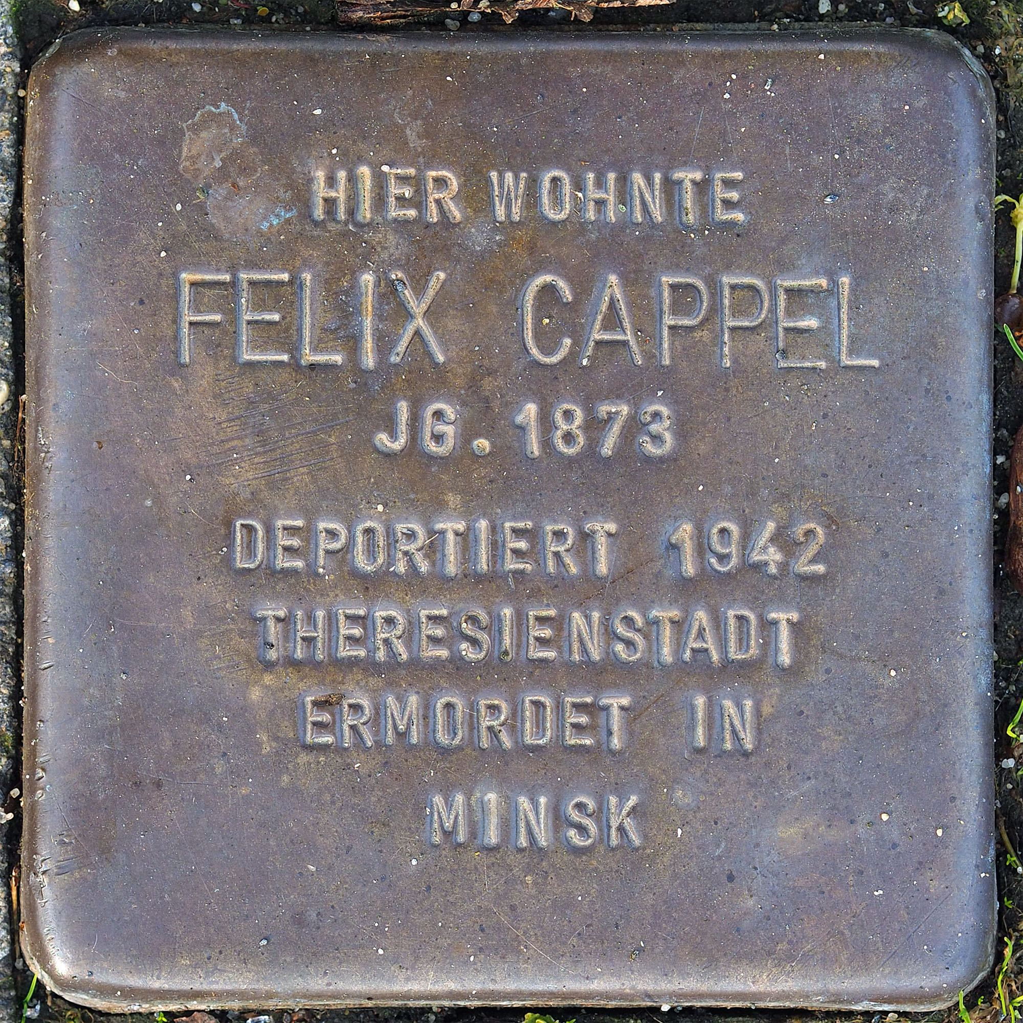 Stolpersteine MG: Cappel, Felix